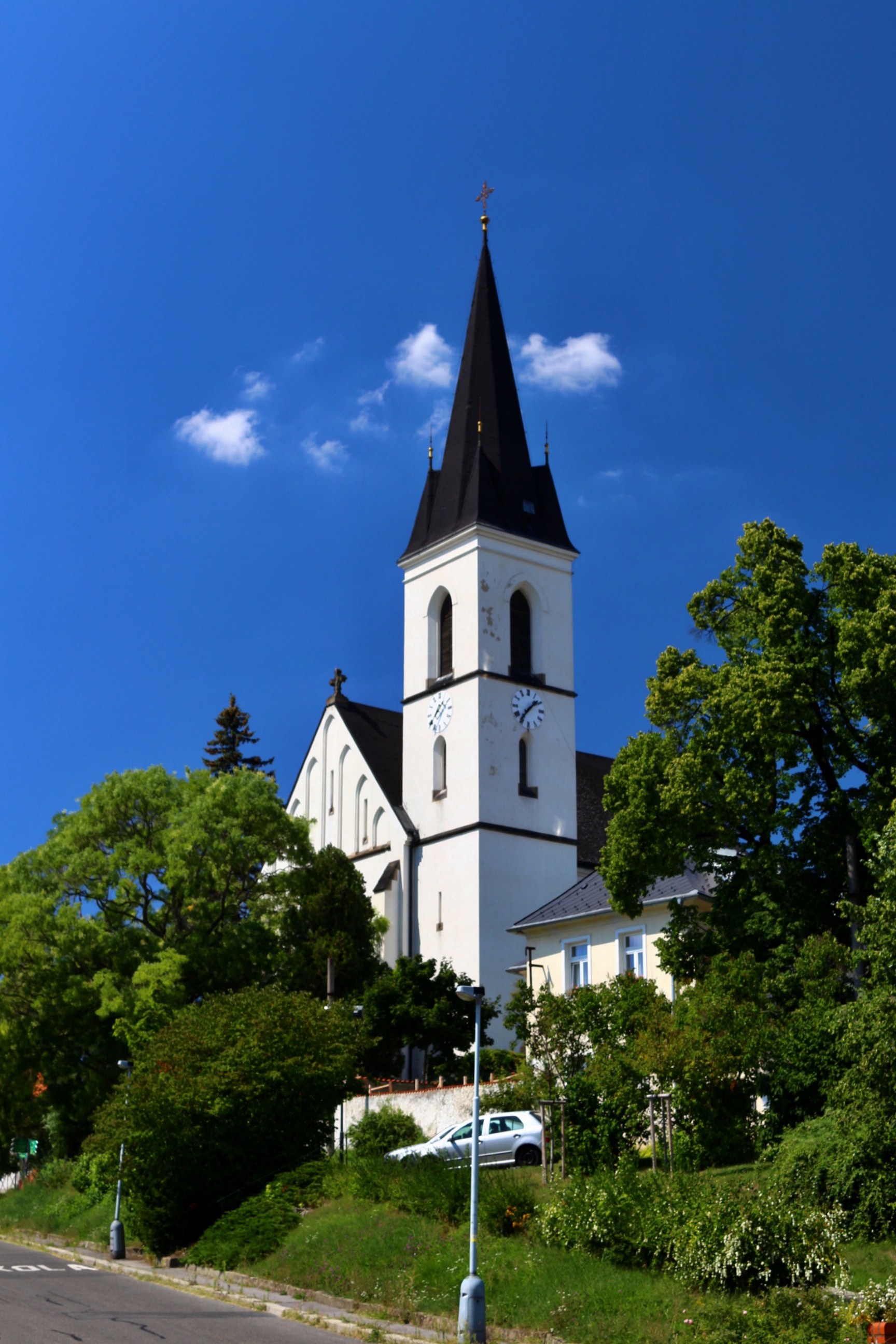 Praha-Stodůlky, kostel sv. Jakuba